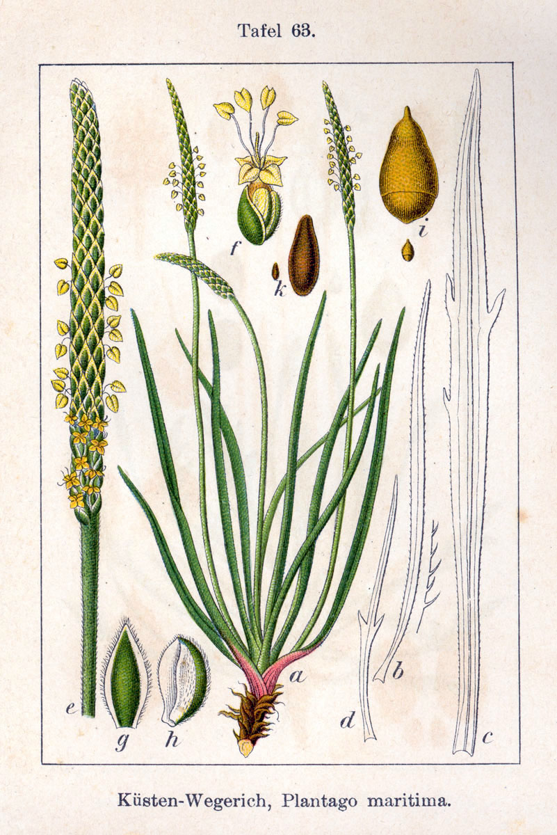 Plantago maritima L. s. l. Original Description Küsten-Wegerich, Plantago maritima